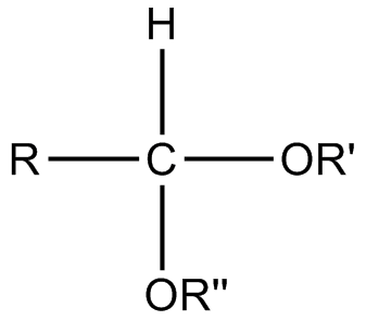 a generic acetal